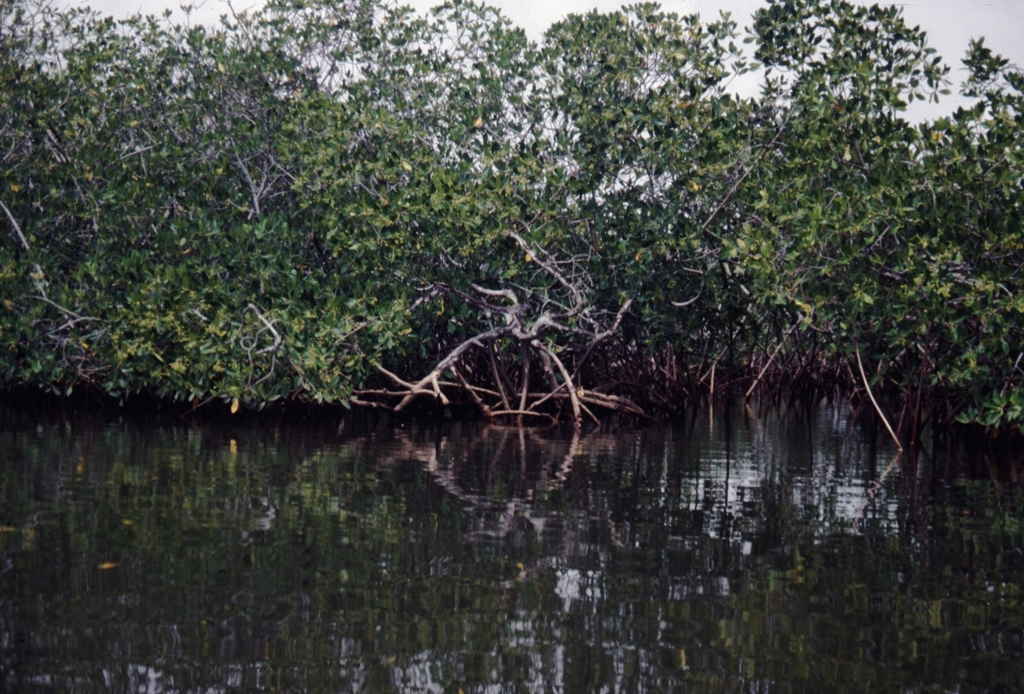 Mangrovenwald an der Lamin Lodge